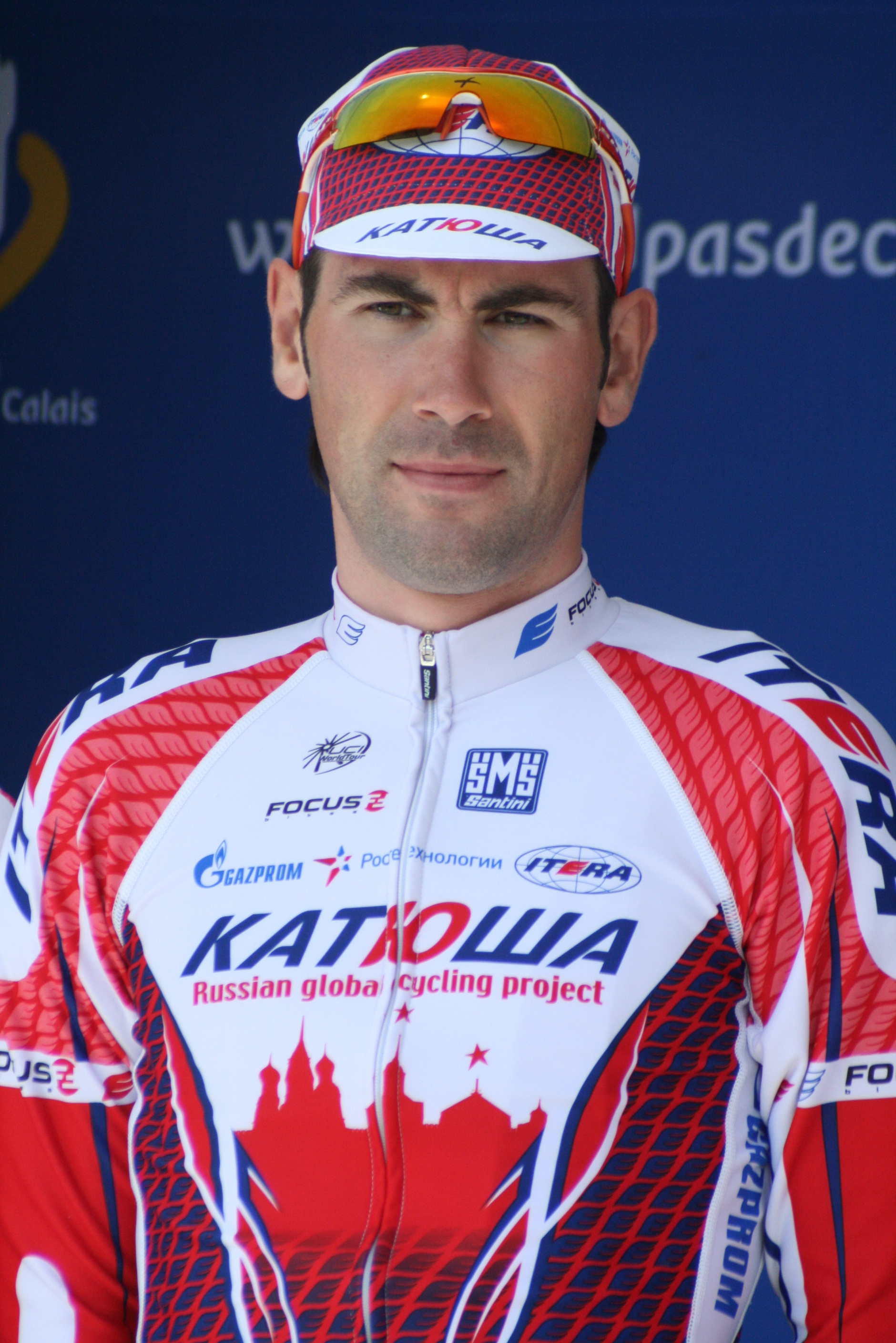 Présentation des coureurs au départ de la première étape Vladimir Isaychev